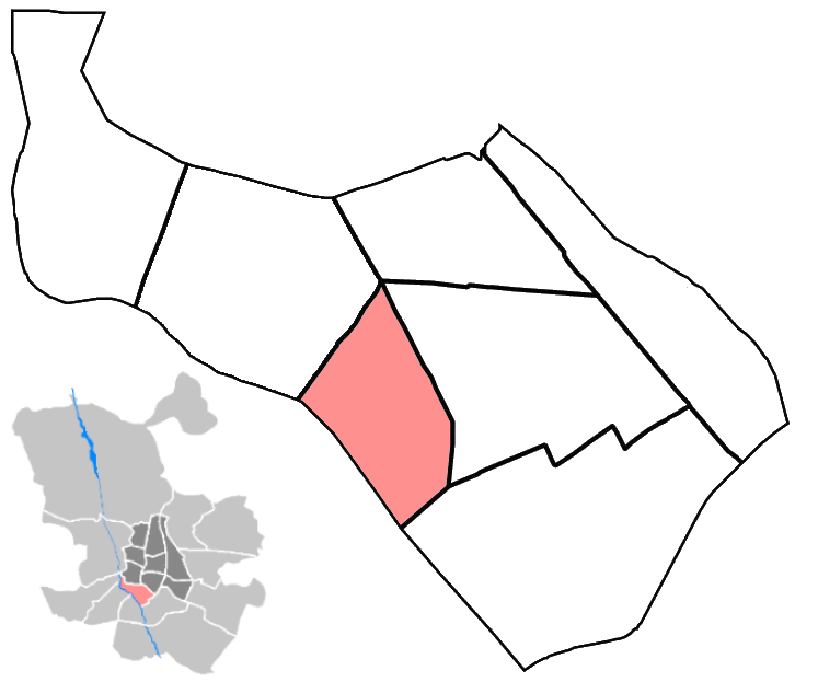 Mapa del barrio de Legazpi. Arganzuela. Madrid. España